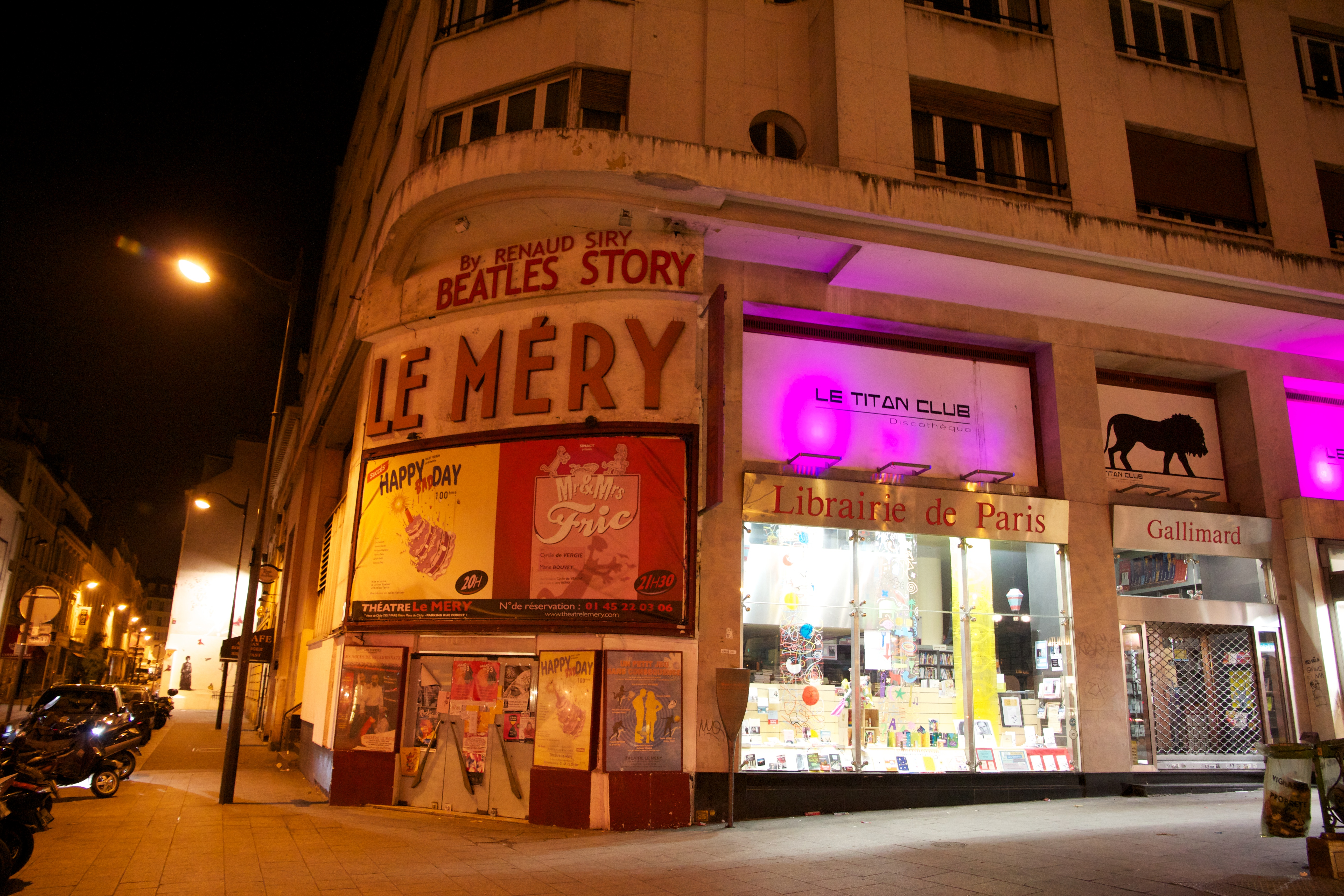 Théâtre Le Méry, Paris.